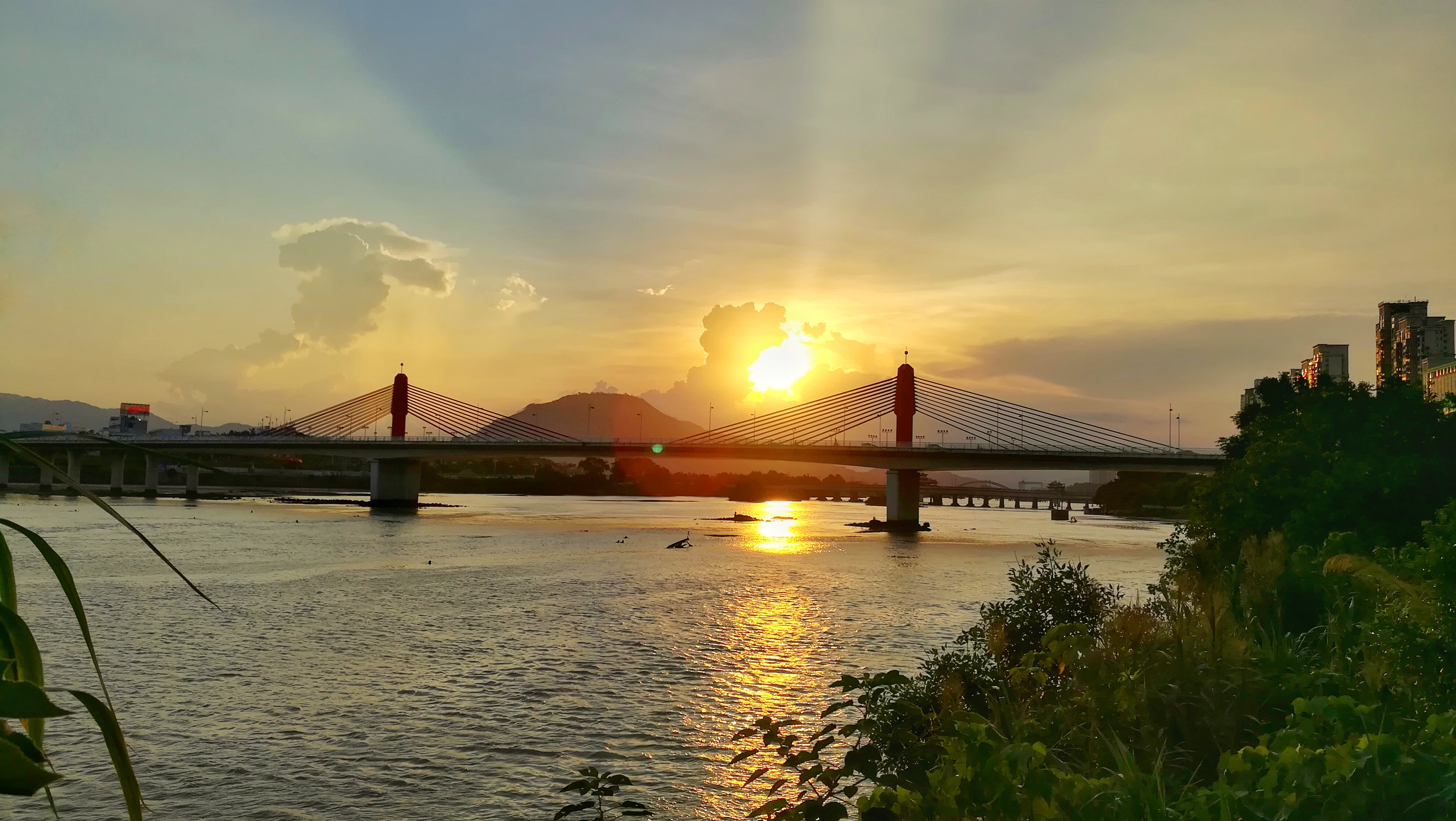 中文（中国大陆）: 九龙江西溪漳州芗城区段